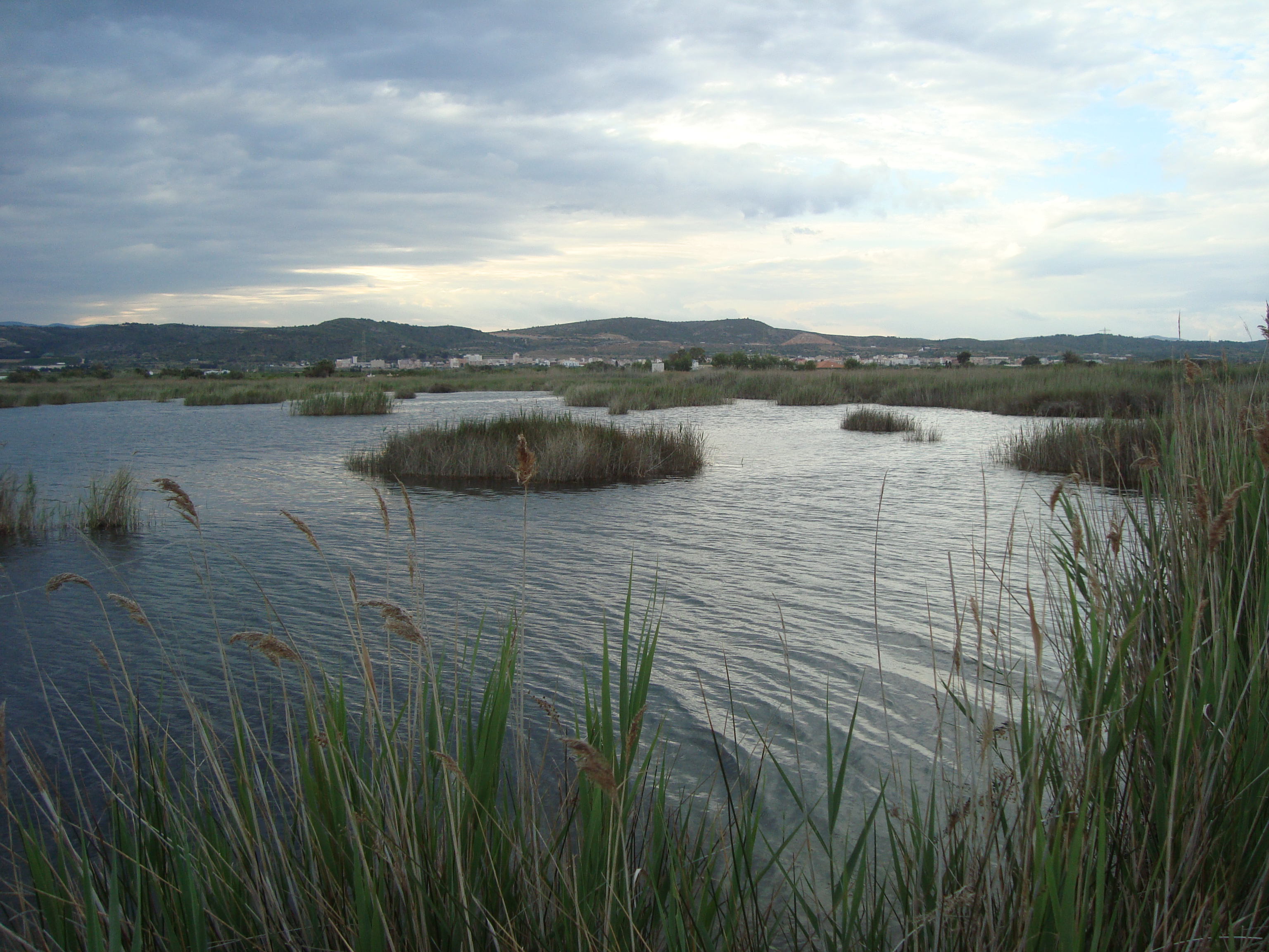 Humedal This is a photography of a Special Area of Conservation in Spain with the ID: ES0000060. Natura2000 entry, EEA entry